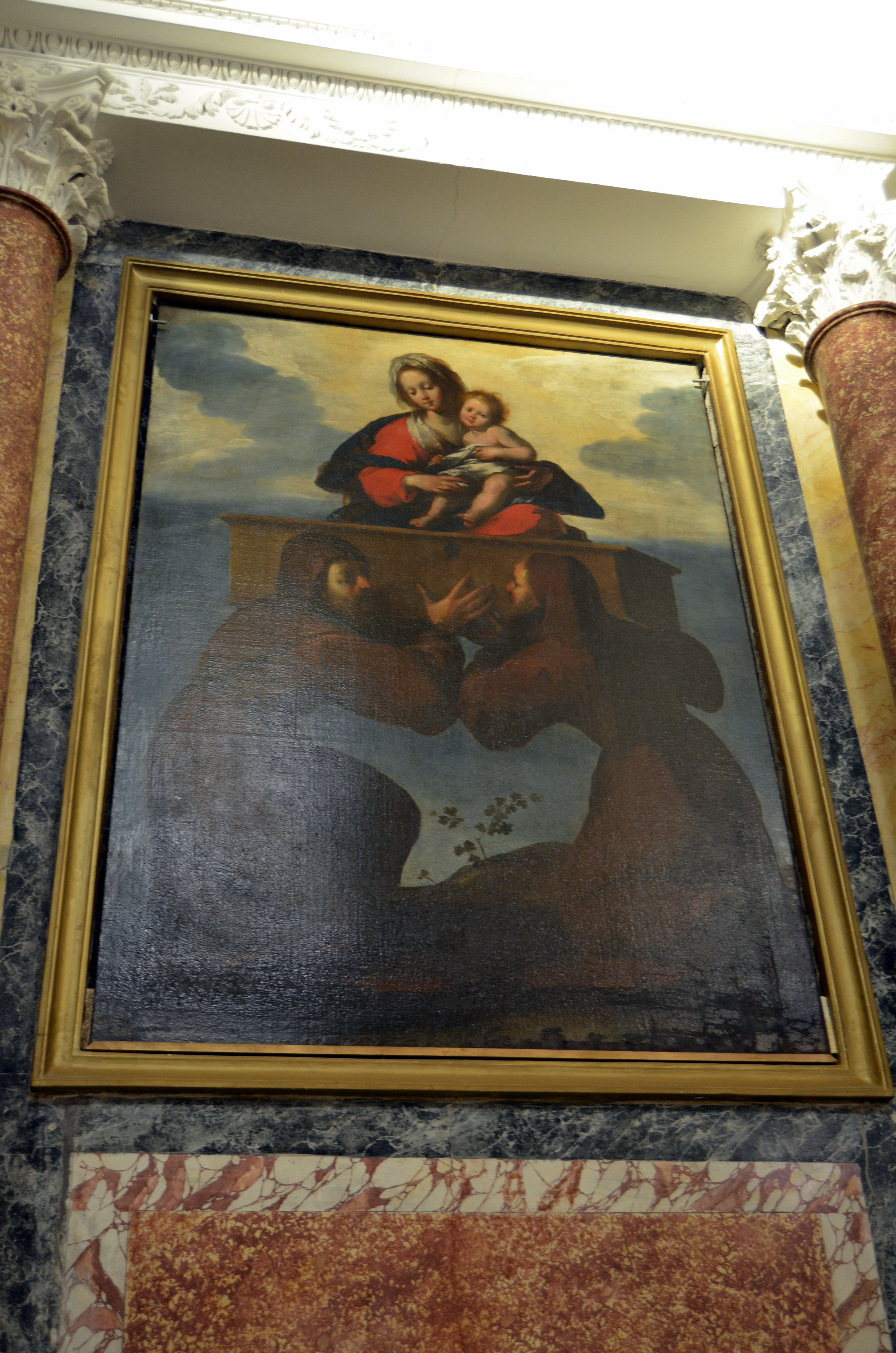 Dipinto della Madonna Odigitria di Bernardo Strozzi nella chiesa di San Maurizio, San Maurizio di Monti, Rapallo, Liguria, Italia